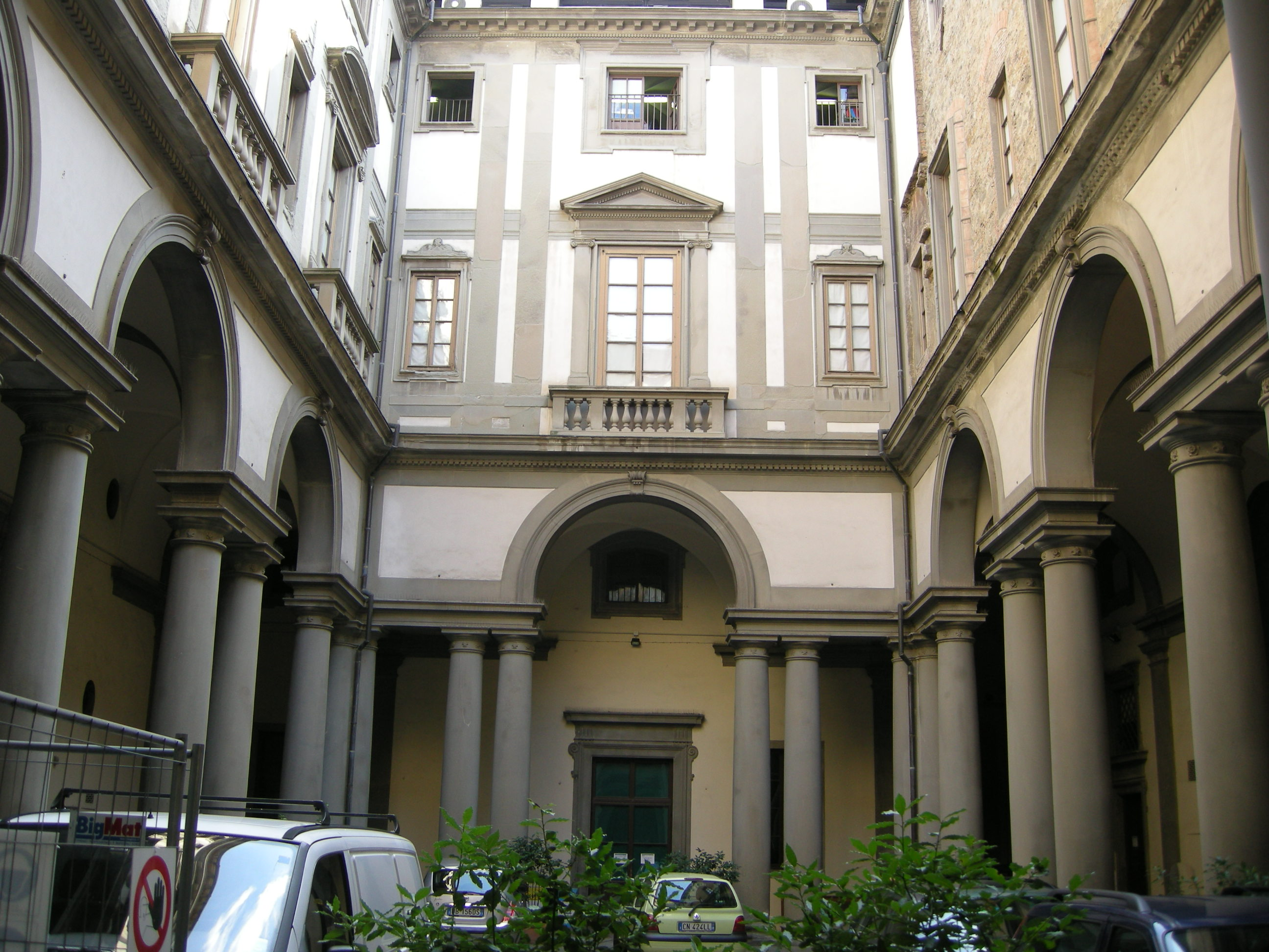 Cortile di Lodovico Cigoli